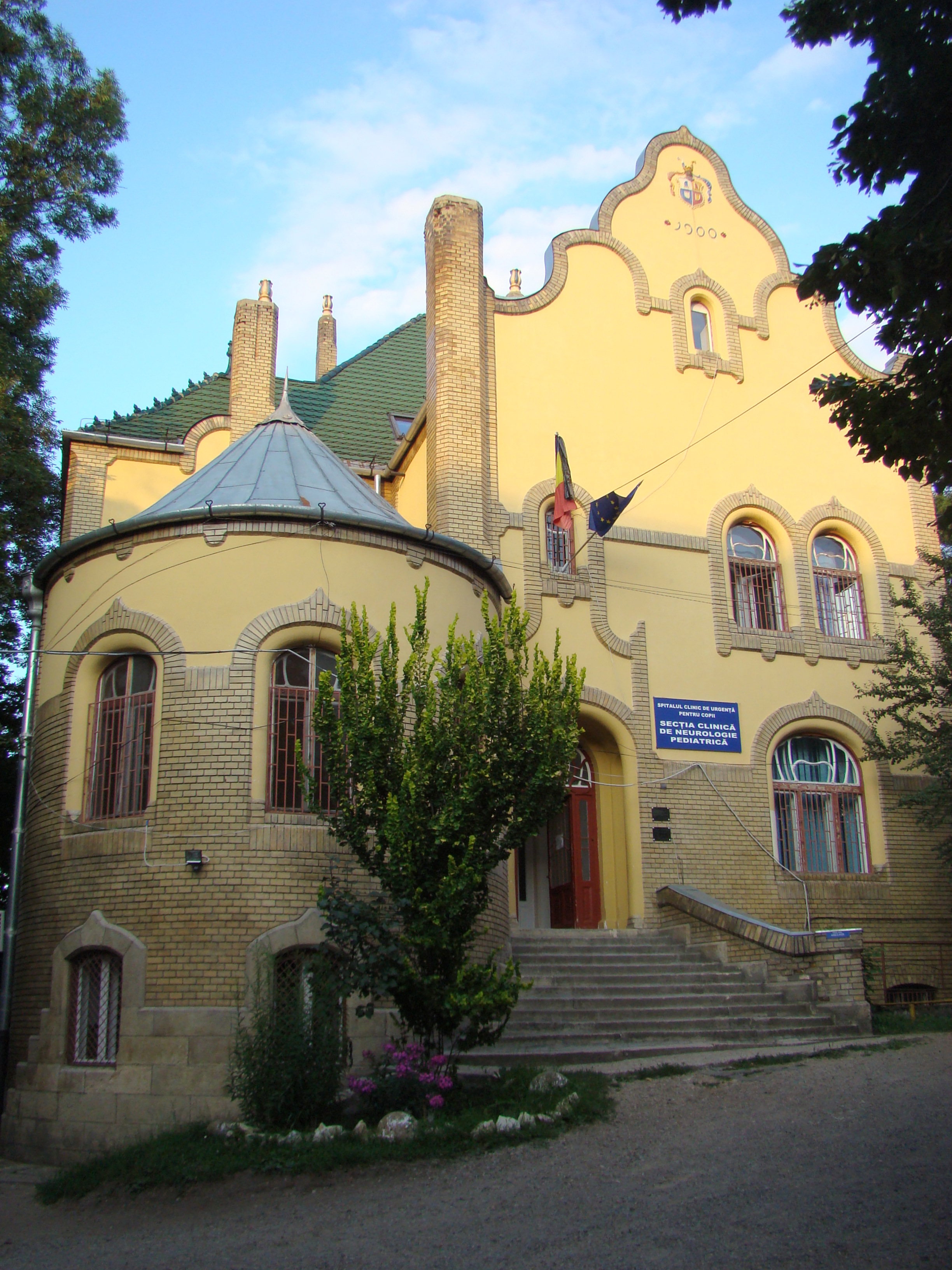 Clădire monument istoric, str. Pasteur, nr.1